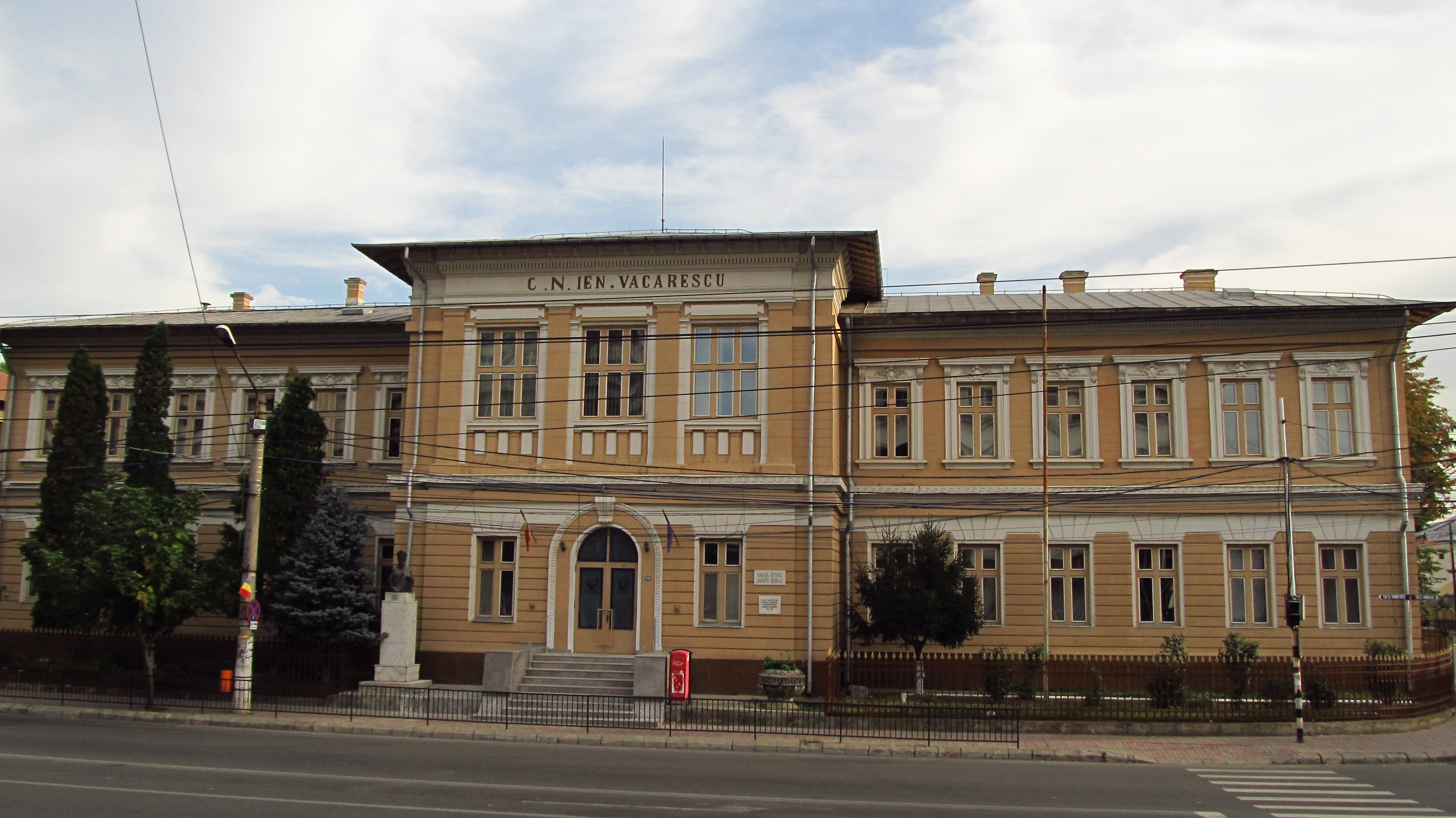 Calea Domnească 235, vedere frontala